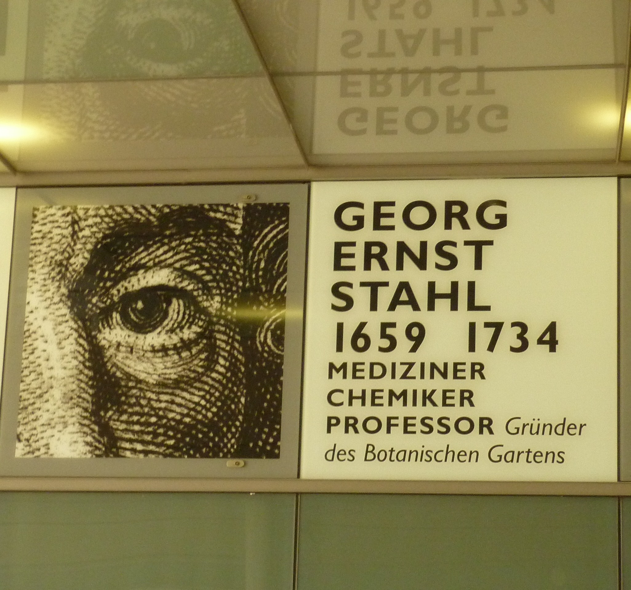 Ehrung für Georg Ernst Stahl auf dem Riebeckplatz in Halle(Saale)